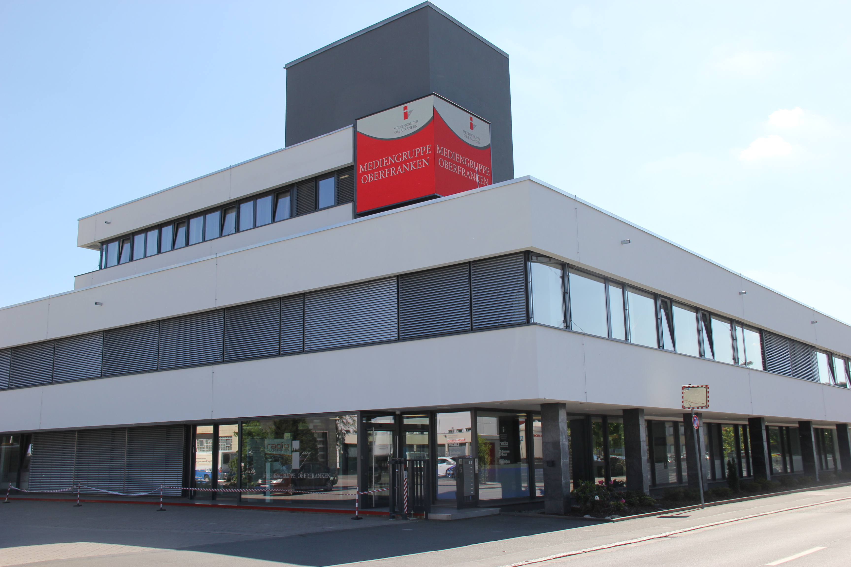 Verlagssitz in der E.-C.-Baumann-Straße 5 in Kulmbach